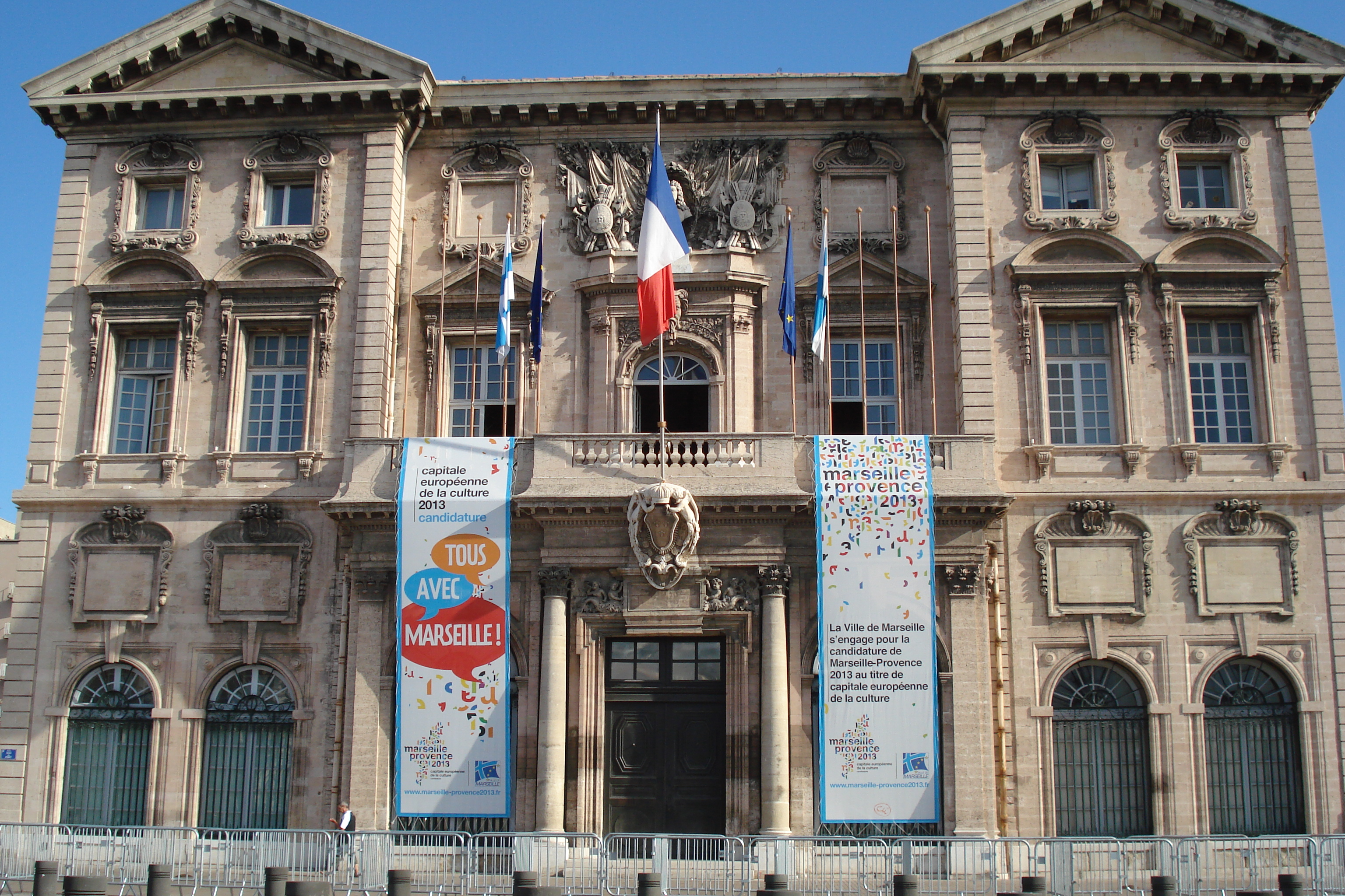 Façade de l'hôtel de ville à Marseille